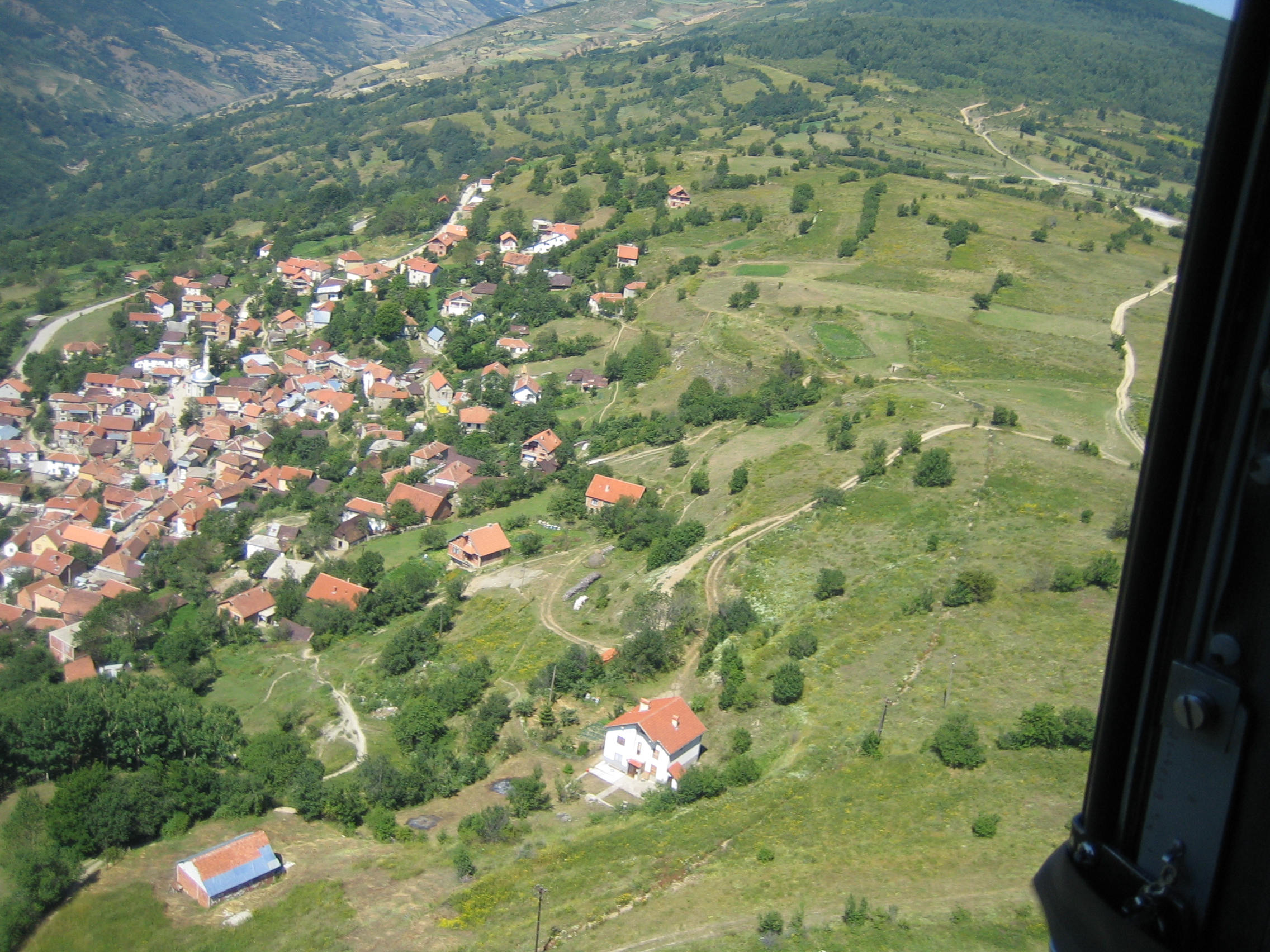 Srpski (latinica): Globocica iz vazduha